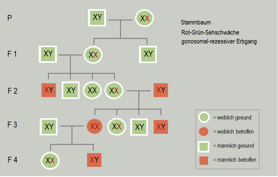 Stammbaum gonosomal-rezessiver Erbgang